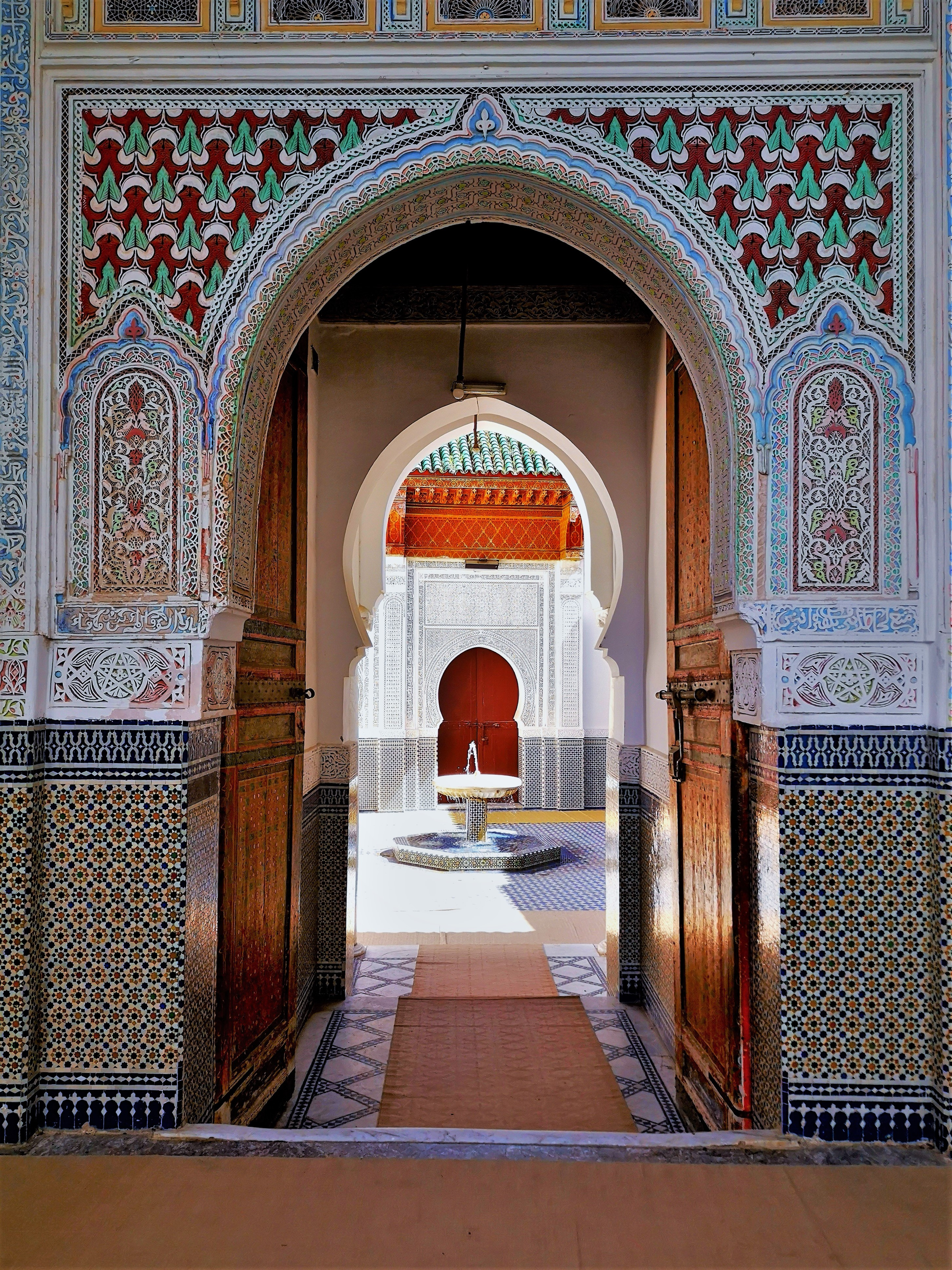 la porte d'entrée au tombeau de Moulay Idriss 1er